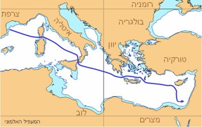 אוניית המעפילים המעפיל האלמוני - מסלול